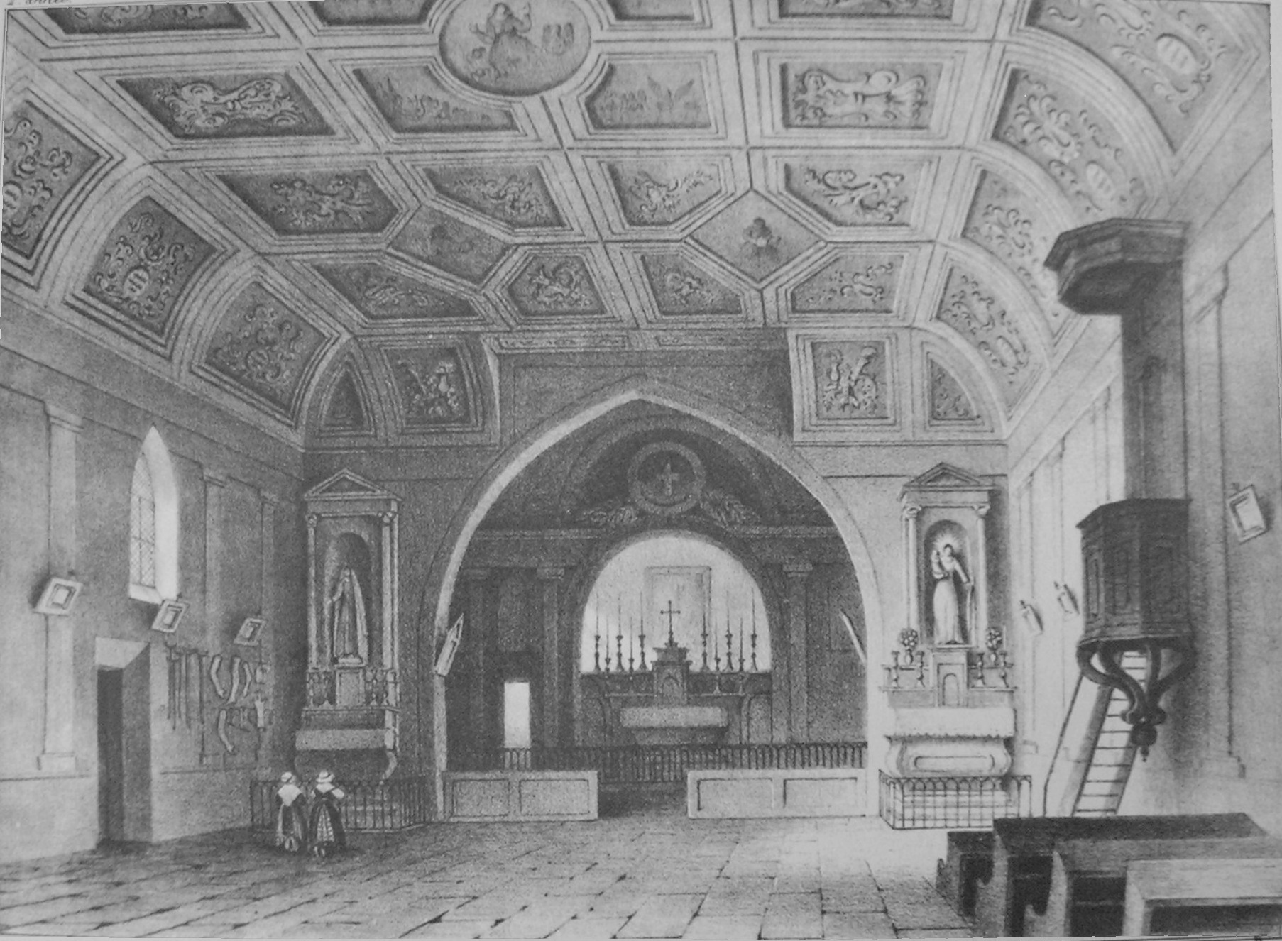 Notre-Dame de LozierATTENTION ! Ce facsimilé est réalisé en applicant des alterations avec un logiciel graphique à une copie numérique, obtenue à partir d'une prise de photo faite par un non-professionnel. Elle pourrait ne pas être parfaitement réussie.